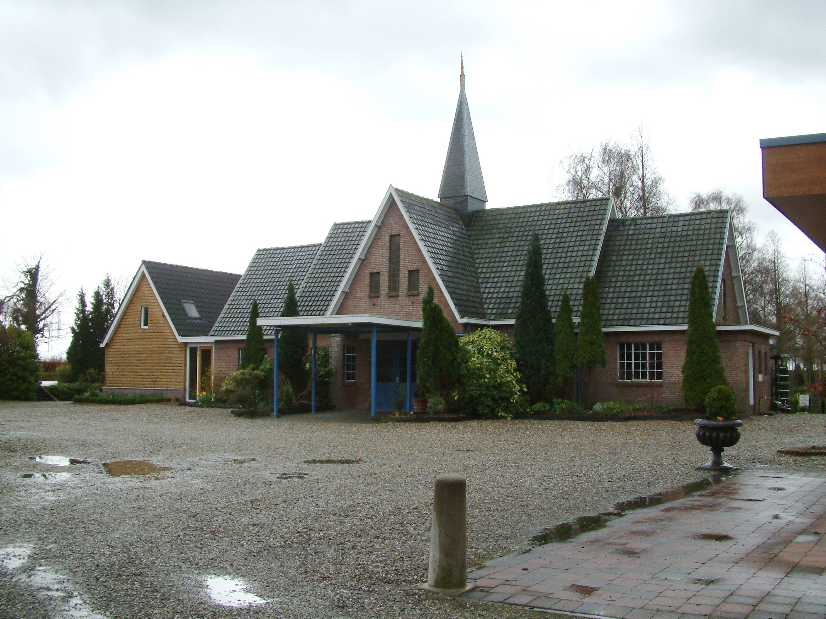 Hervormde begraafplaats Charlois, de Kapel